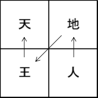 天王地人コート